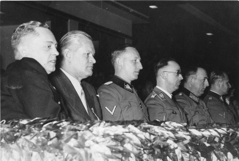 Zum Tag der Deutschen Polizei Deutsche Polizei führte am 16.2.1941 ein grosses Sammelwerk für das 2. Deutsche Kriegswinterhilfswerk durch, das in Berlin seinen Höhepunkt in einem bunten Hallensportfest in der Deutschlandhalle erreichte. UBz: unter den Ehrengästen in der Deutschlandhalle sah man u.a. v.r. 1. Wolff, 2. den Chef der Ordnungspolizei General Daluege, 3. Reichsführer SS und Chef der Deutschen Polizei Himmler, 4. Obergruppenführer Heydrich und 5. Ritter von Halt.